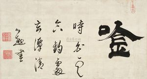 中文（香港）: 立軸紙本“吟”，30×55cm ，東皋心越